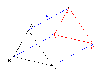 Illustration d'une translation géométrique. Image personnelle. Licence GFDL